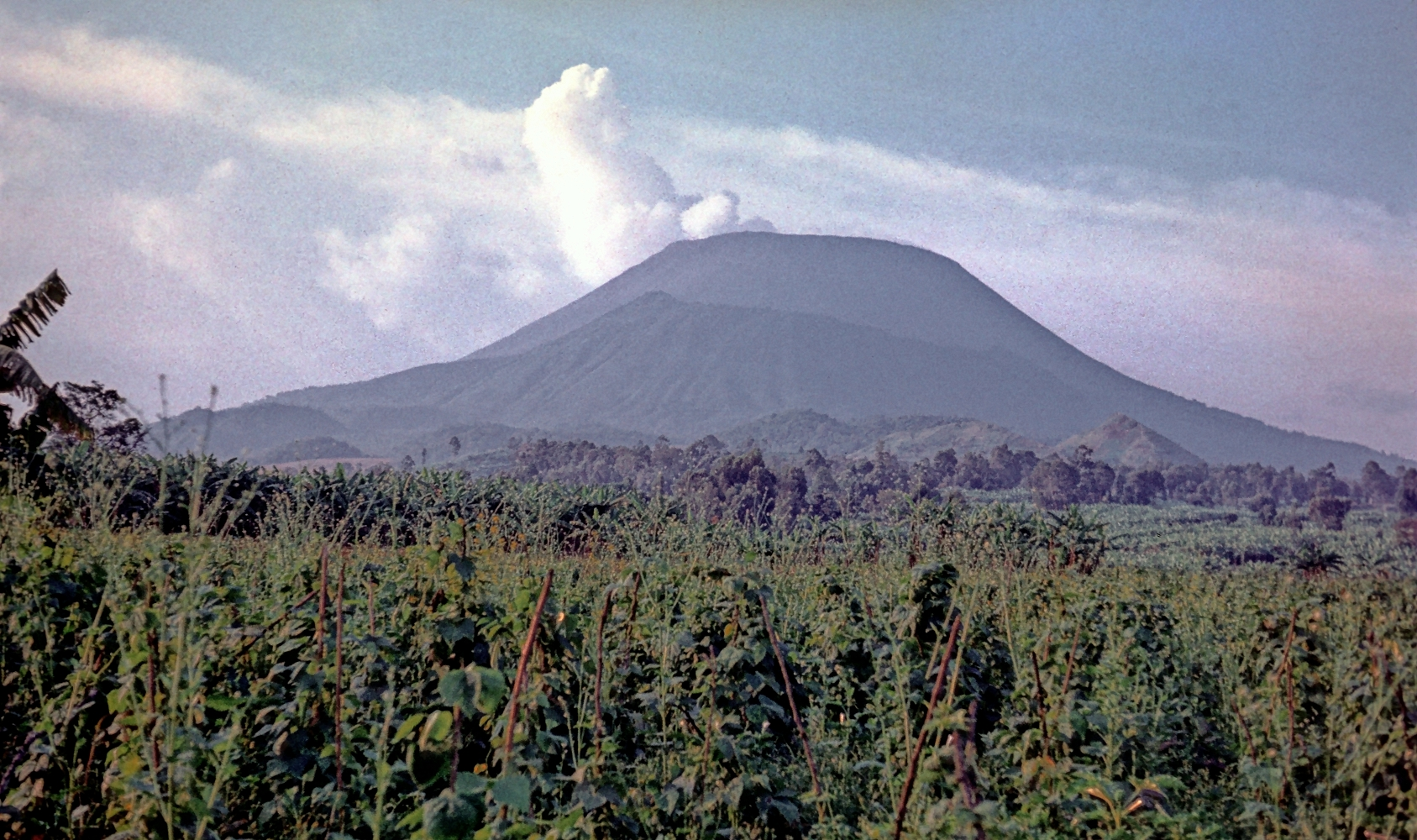 Вулкан Ньирагонго в 1975 году